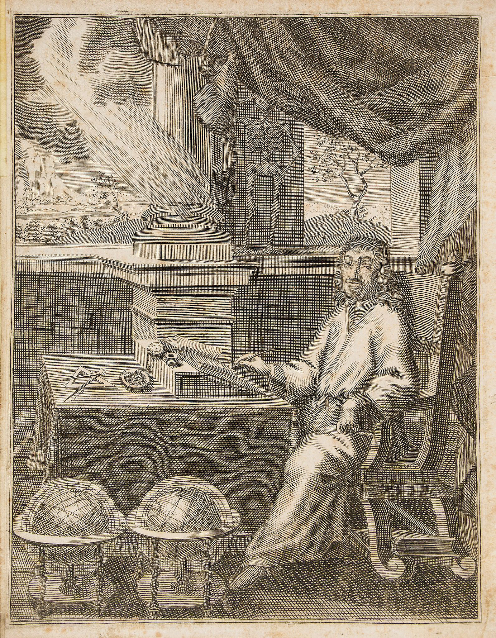 Frontispice